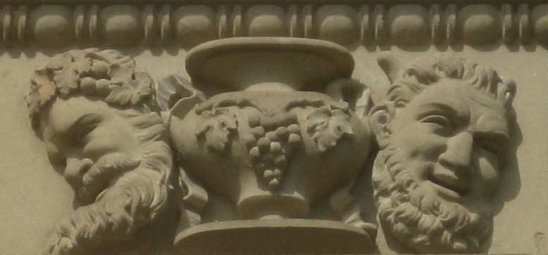 Stuttgart, Villa Berg, Südfassade, Mittelportale, Kämpferrelief 12 (Zählung von links nach rechts).